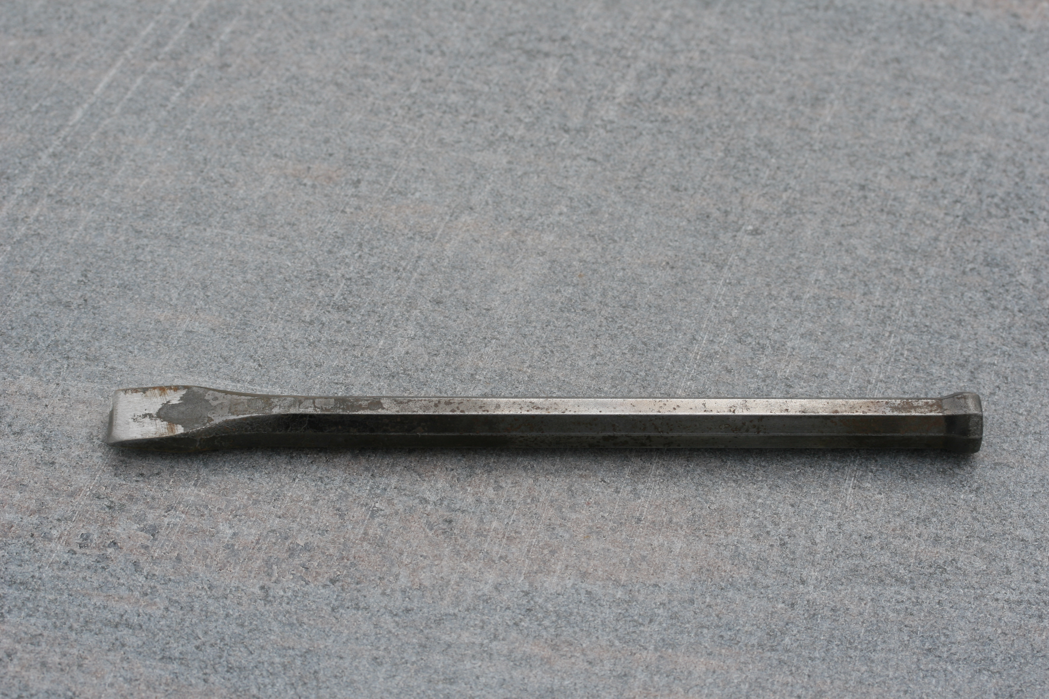 Beizeisen